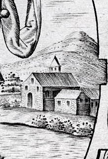 Bleidenstadt, Stiftskirche St. Ferrutius, vor ihrer Zerstörung 1632